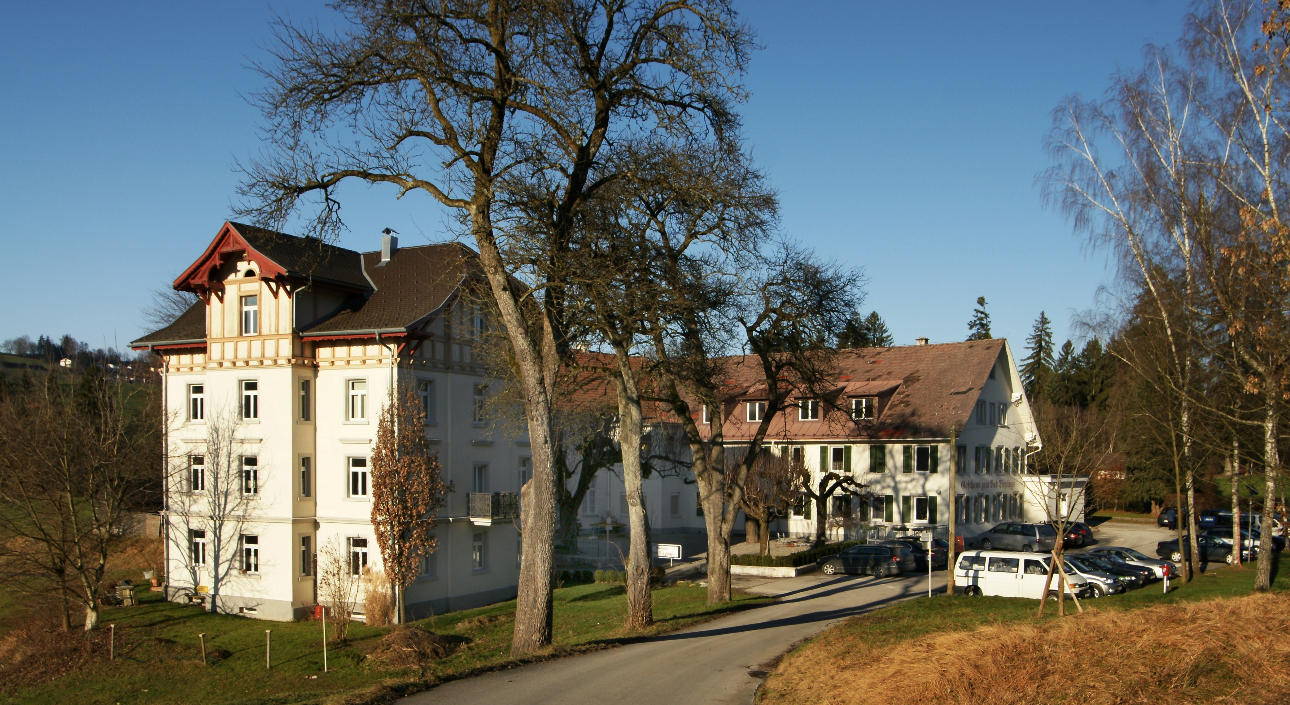 Diezlinger Straße 51+52; Gasthaus zum Bad Diezlings in Hörbranz, Vorarlberg.